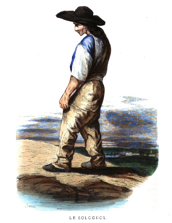 Les Français peints par eux mêmes - Le Solognot.